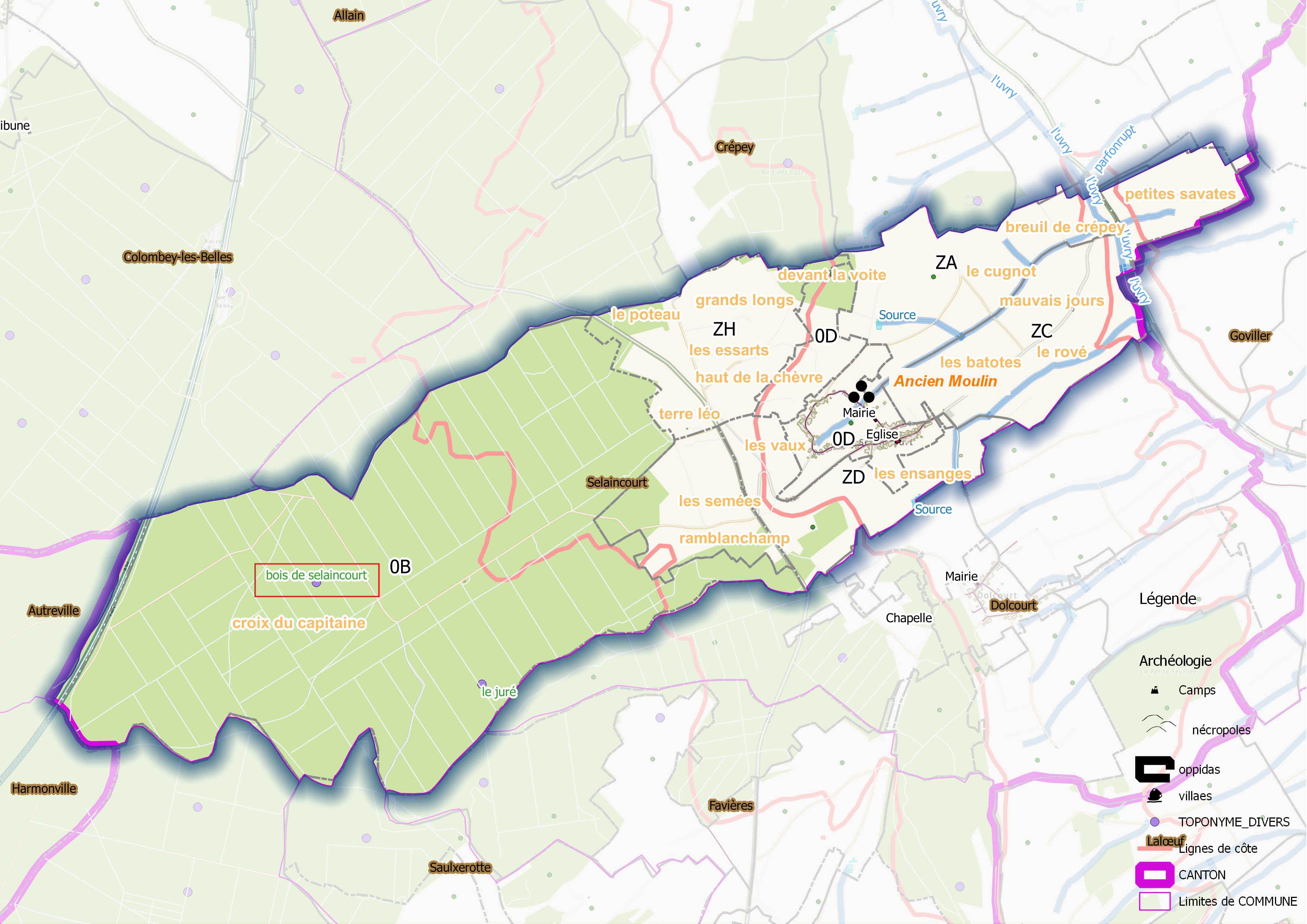 Selaincourt (ban communal) Osm et Qgis, mentions manuscrites